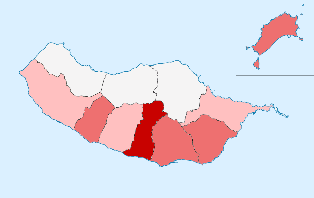 Mapa de municipios afetados pela COVID-19 na Região Autónoma da Madeira